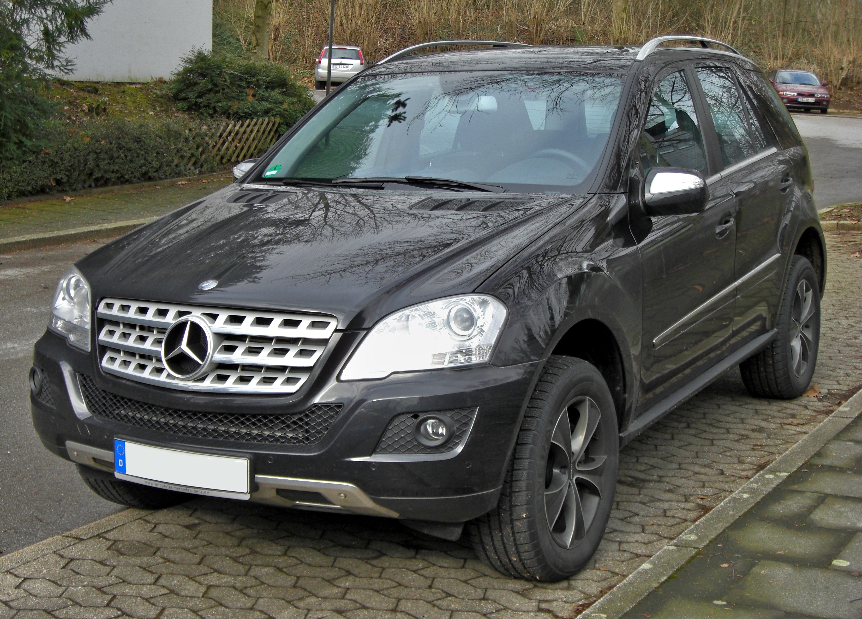 Mercedes ML